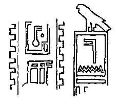 Tonsiegel des König Ninetjer